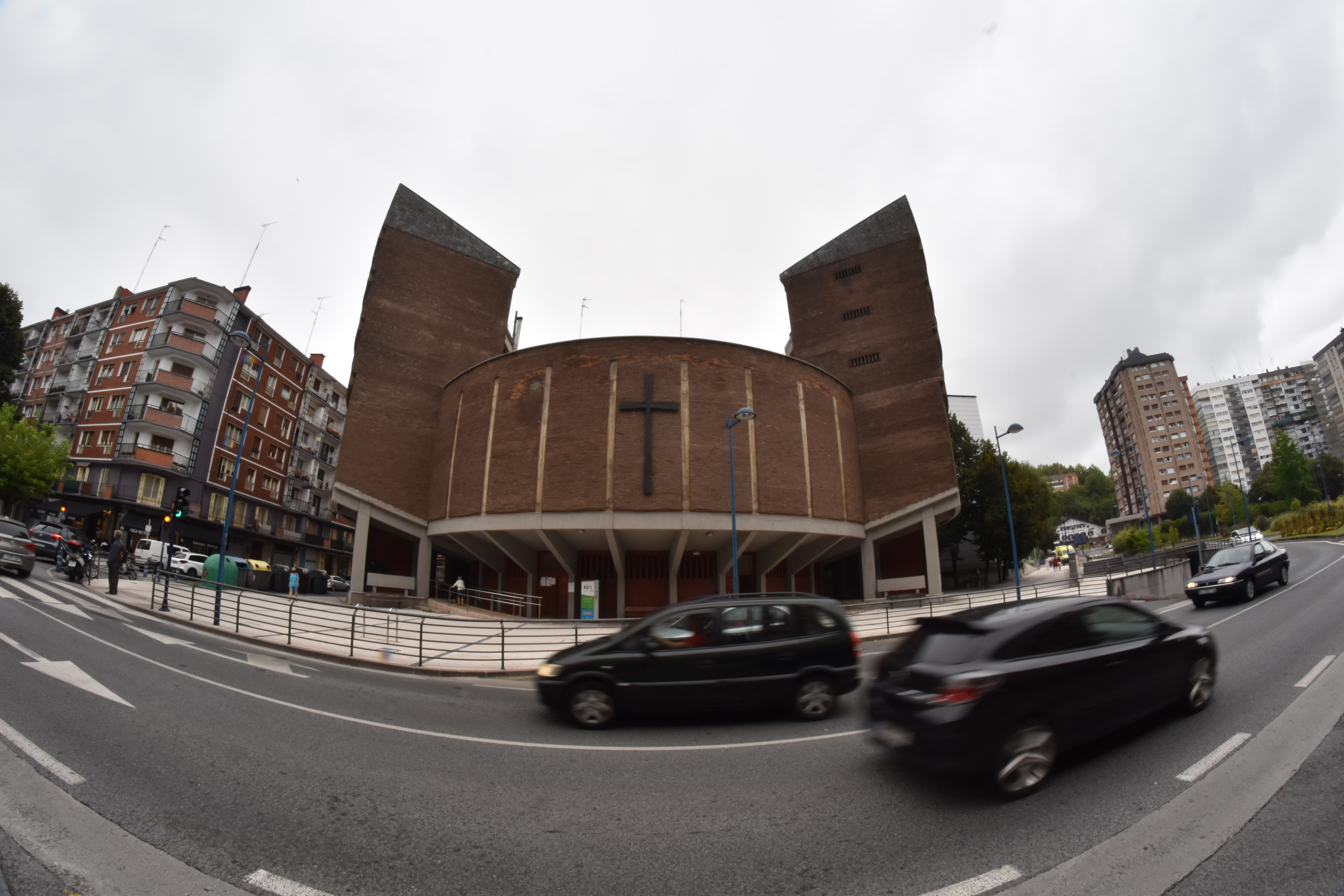 Iztietako San Jose Langilea eliza, Errenterian